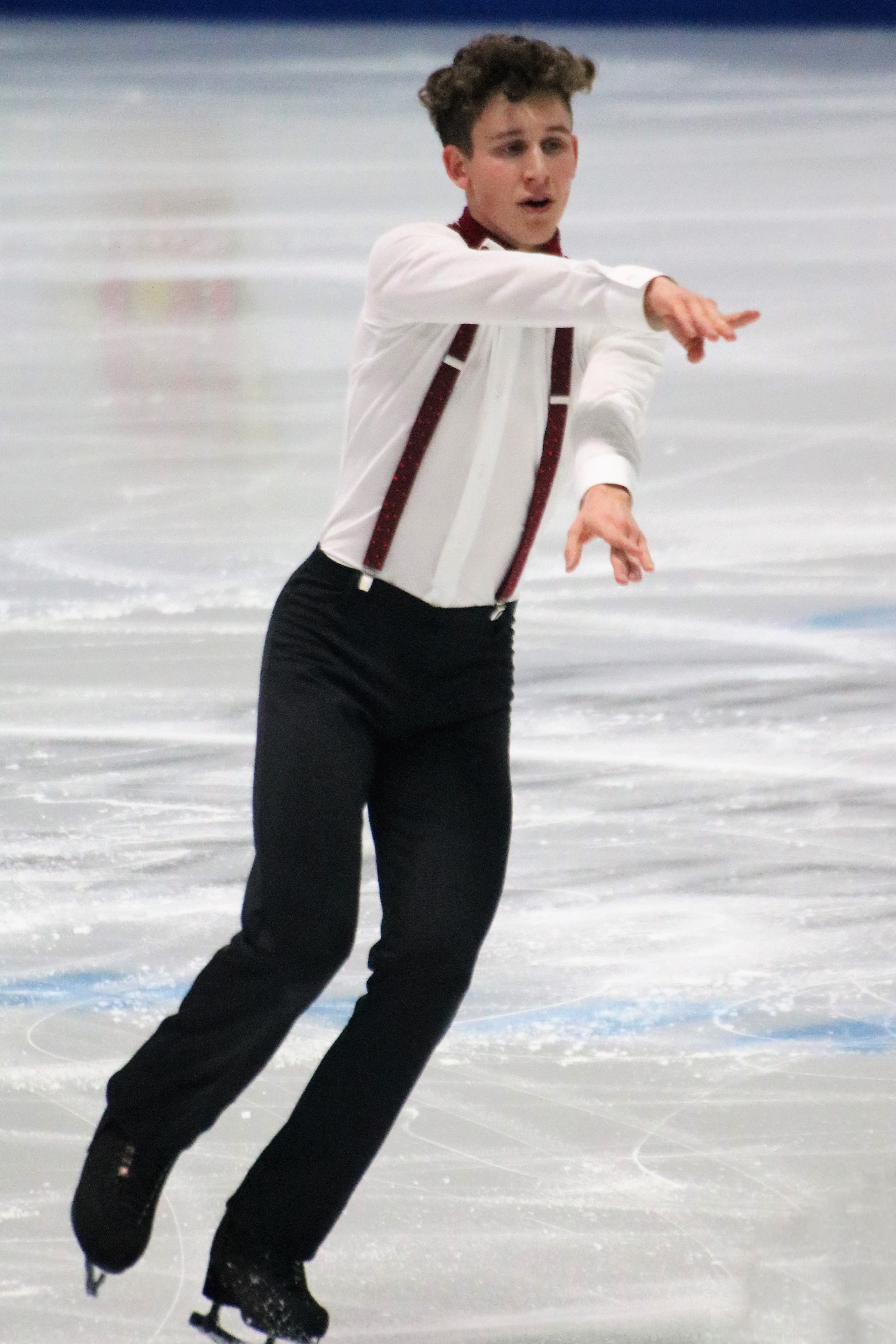 Лукас Бриджи (Швейцария) на чемпионате Европы по фигурному катанию 2020